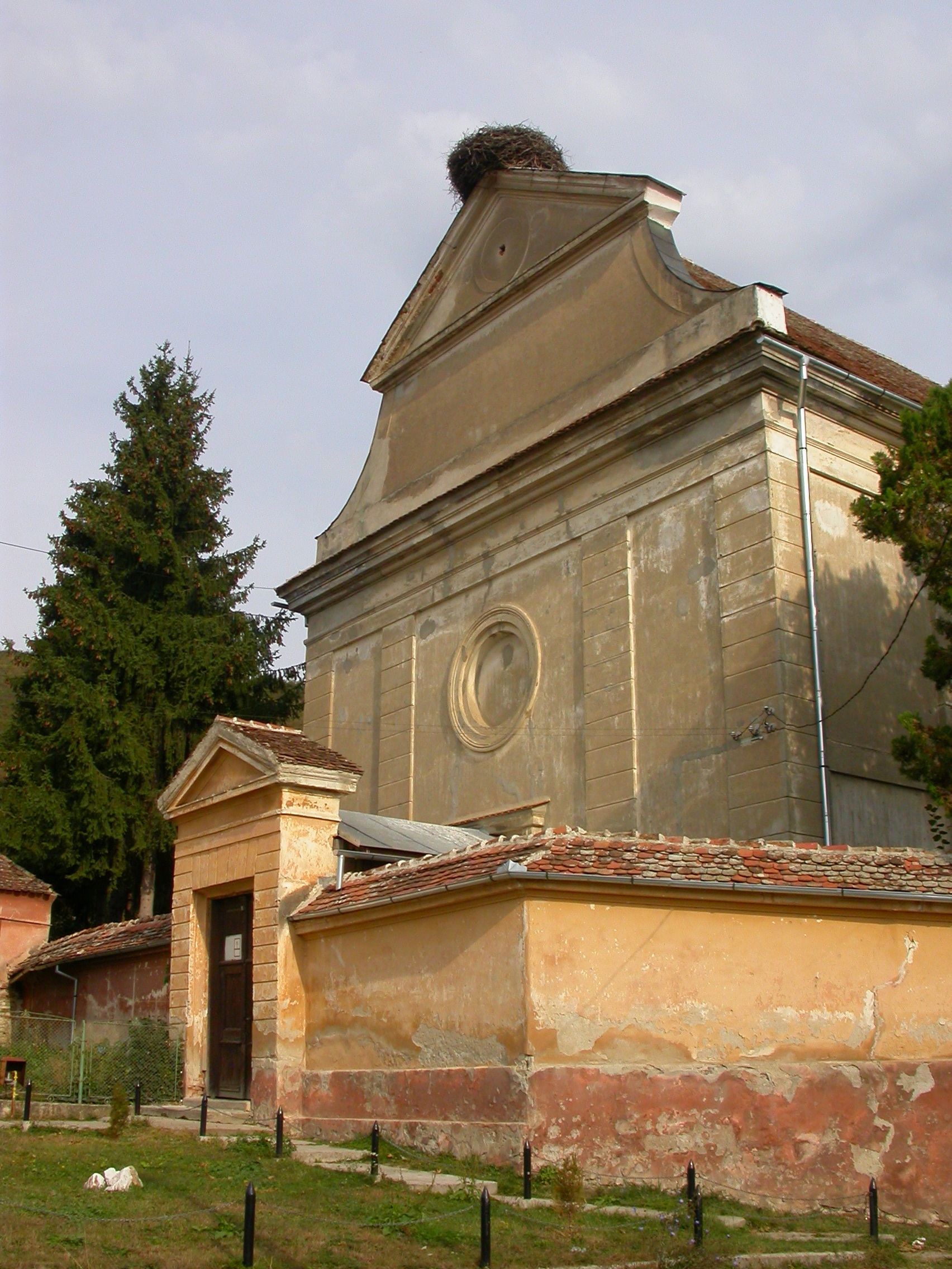 Ansamblul bisericii evanghelice, sec. XV - XIX